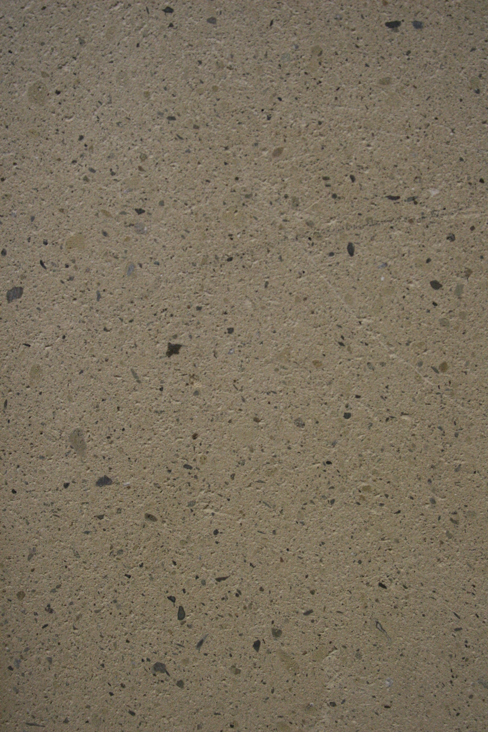 Weiberner Tuff aus Weibern in der Eifel